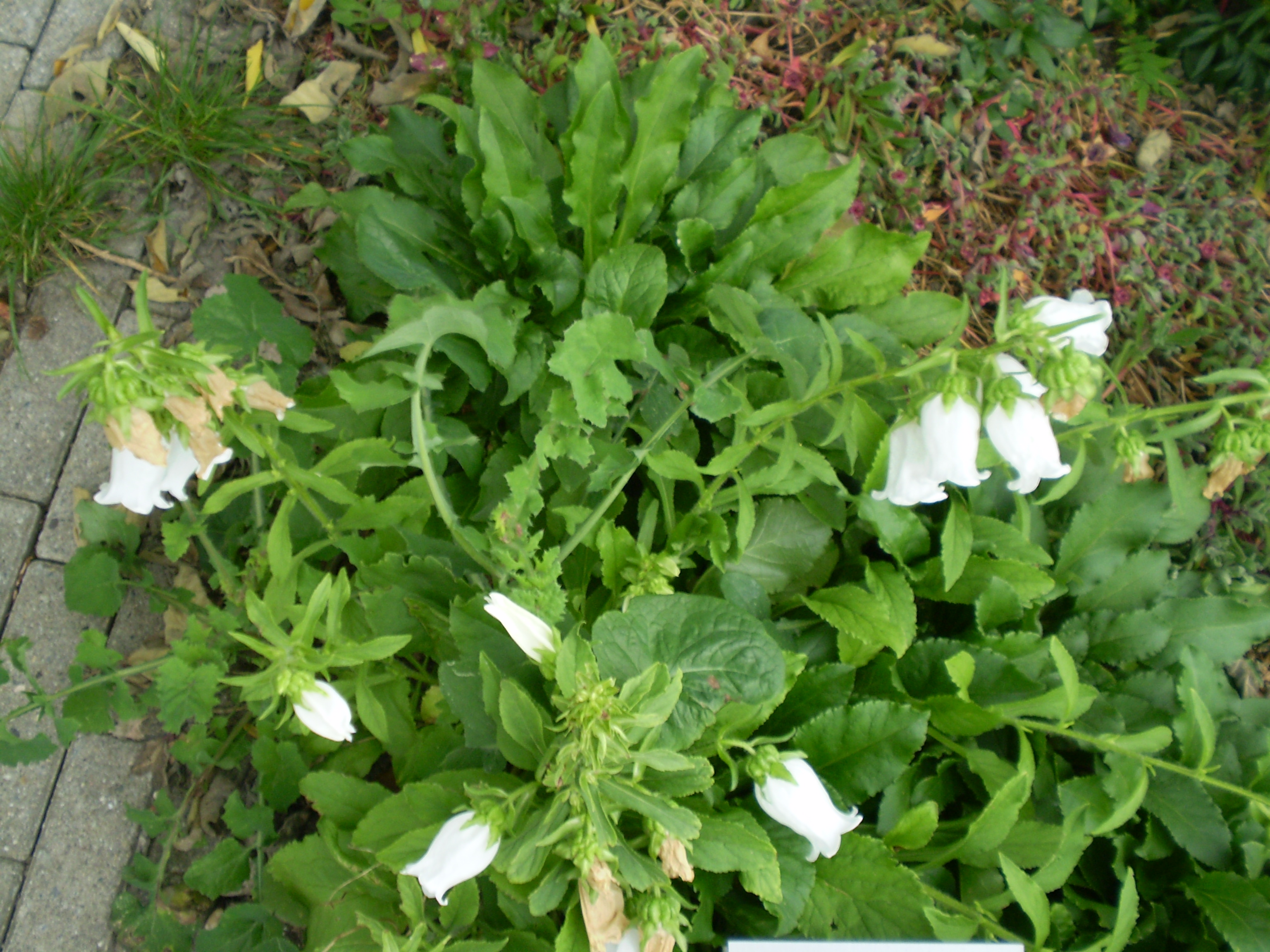 Campanula medium mariete klokje